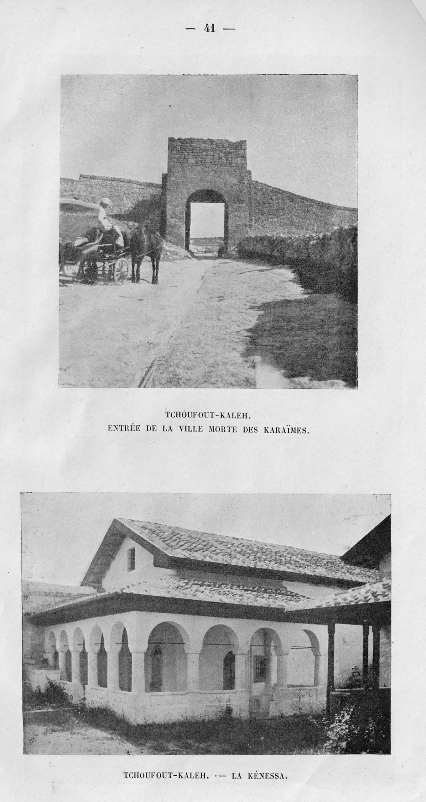 En Crimee / par le baron de Baye. - Librairie Nilsson, 1906. - 55 с. Википедия: До 1911 года молитвенный дом караимов называли синагогой. В 1892 г. трокскими караимами была подана петиция о переименовании караимских «синагог» в «кенасы»[3]. На этот запрос было послано письмо гахама Панпулова от 31.12.1893, как его ответ на просьбу Трокского гахама о переименовании синагог в кенассы. Письмо предназначено министру внутренних дел[4]. В 1911 году гахам С. М. Панпулов обратился в МВД с ходатайством о переименовании караимских «синагог» в «кенасы». В связи с этим ДДДИИ МВД отправило запрос в адрес и. о. Трокского и Виленского караимского гахама И. Н. Фирковича, который заявил, что слово «кенаса» происходит от корня древнееврейского глагола «канос» (собирать) и что в средневековых караимских летописях кенаса «служила наименованием мест общественного богослужения караимов»[5]. Ныне караимы используют преимущественно термин «кенаса» («кенеса», «кенасса») или "бет гакнесет, (ивр. בית הכנסת), буквально -«дом собрания» (первоначальное древнееврейское название синагоги, употребляемое также раввинистами).